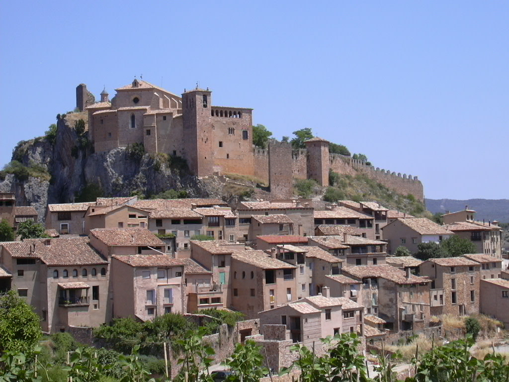 Alquézar